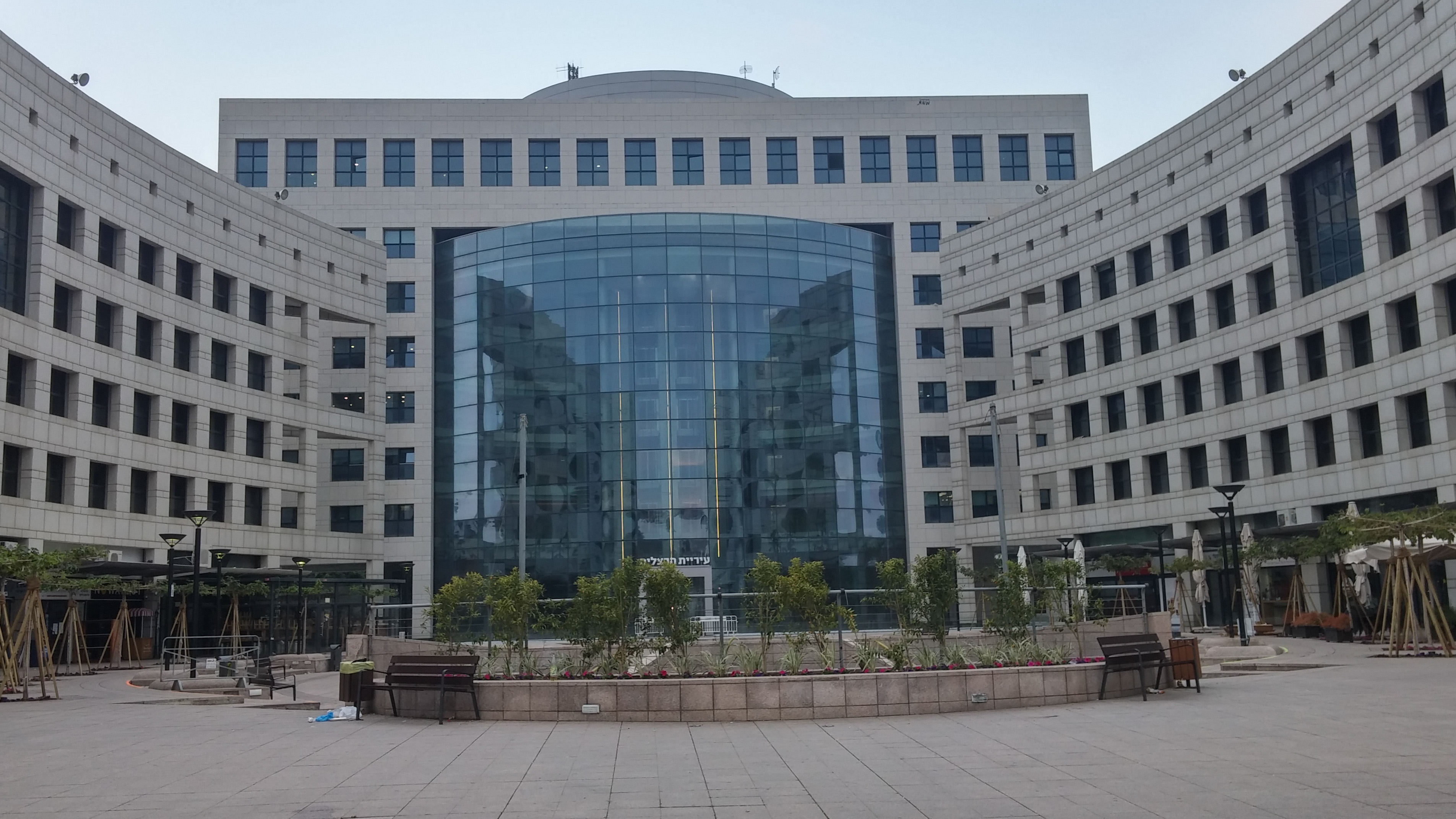 הרצליה - בית העירייה החדש